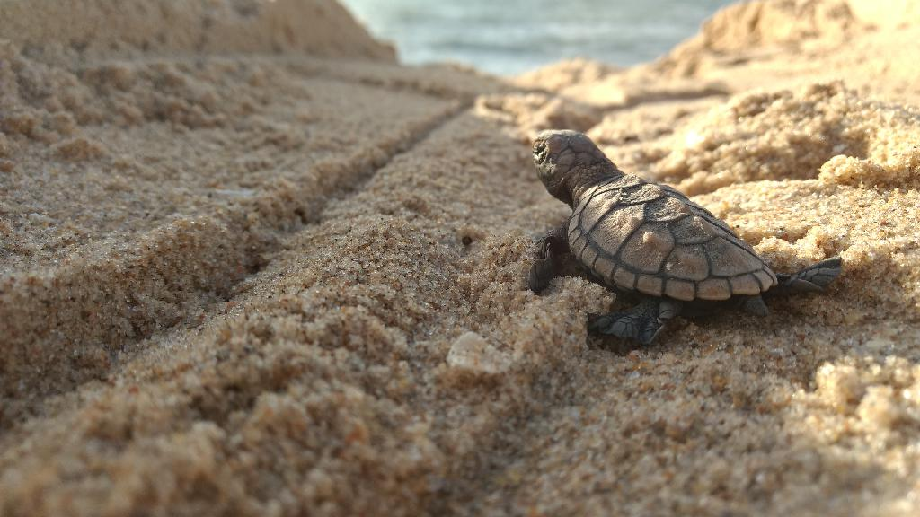 Tartaruga de pente nascida na praia do Janga, Paulista, Pernambuco, Brasil, em 26/04/2017